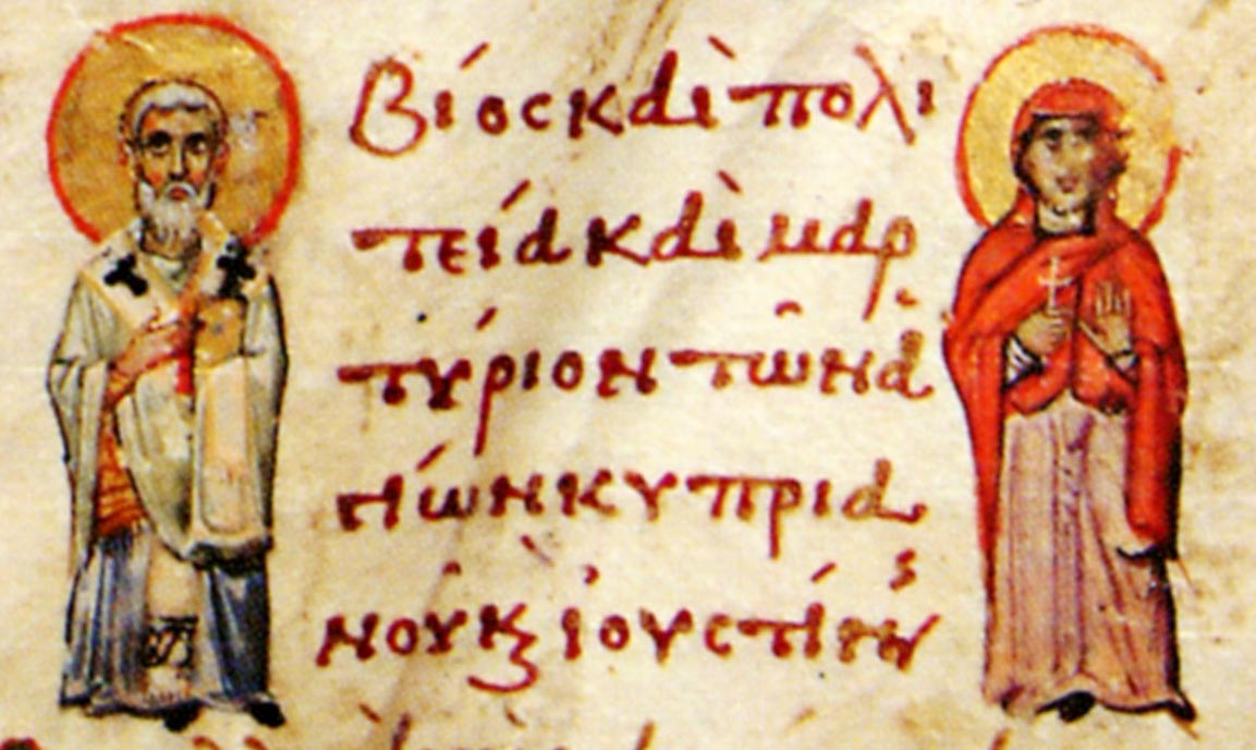 Священномученик Кипріян і мучениця Юстина. Мініатюра Мінологія на жовтень, середина XI ст. Візантія